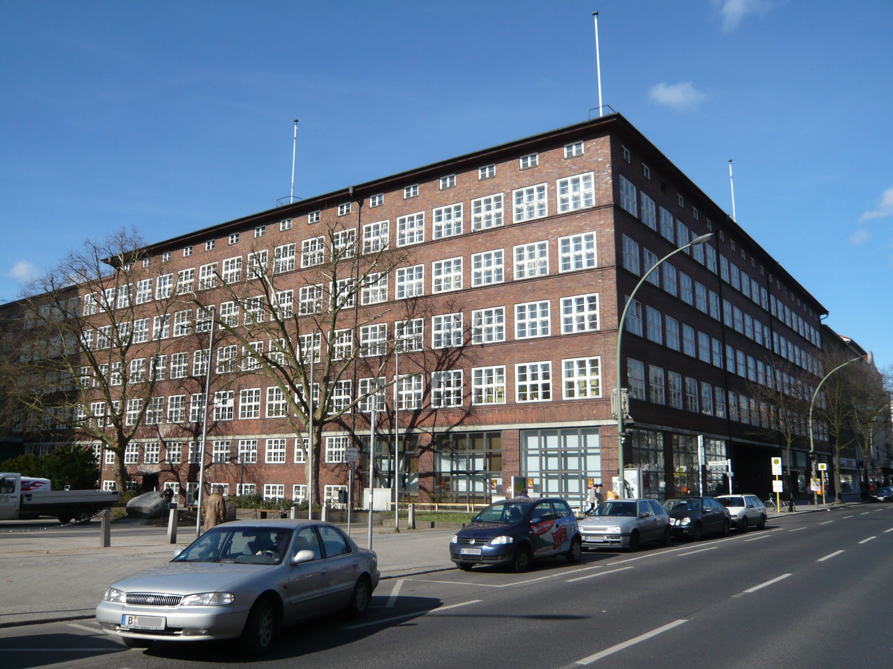 Rathaus Wedding in der Müllerstraße, "Altbau"